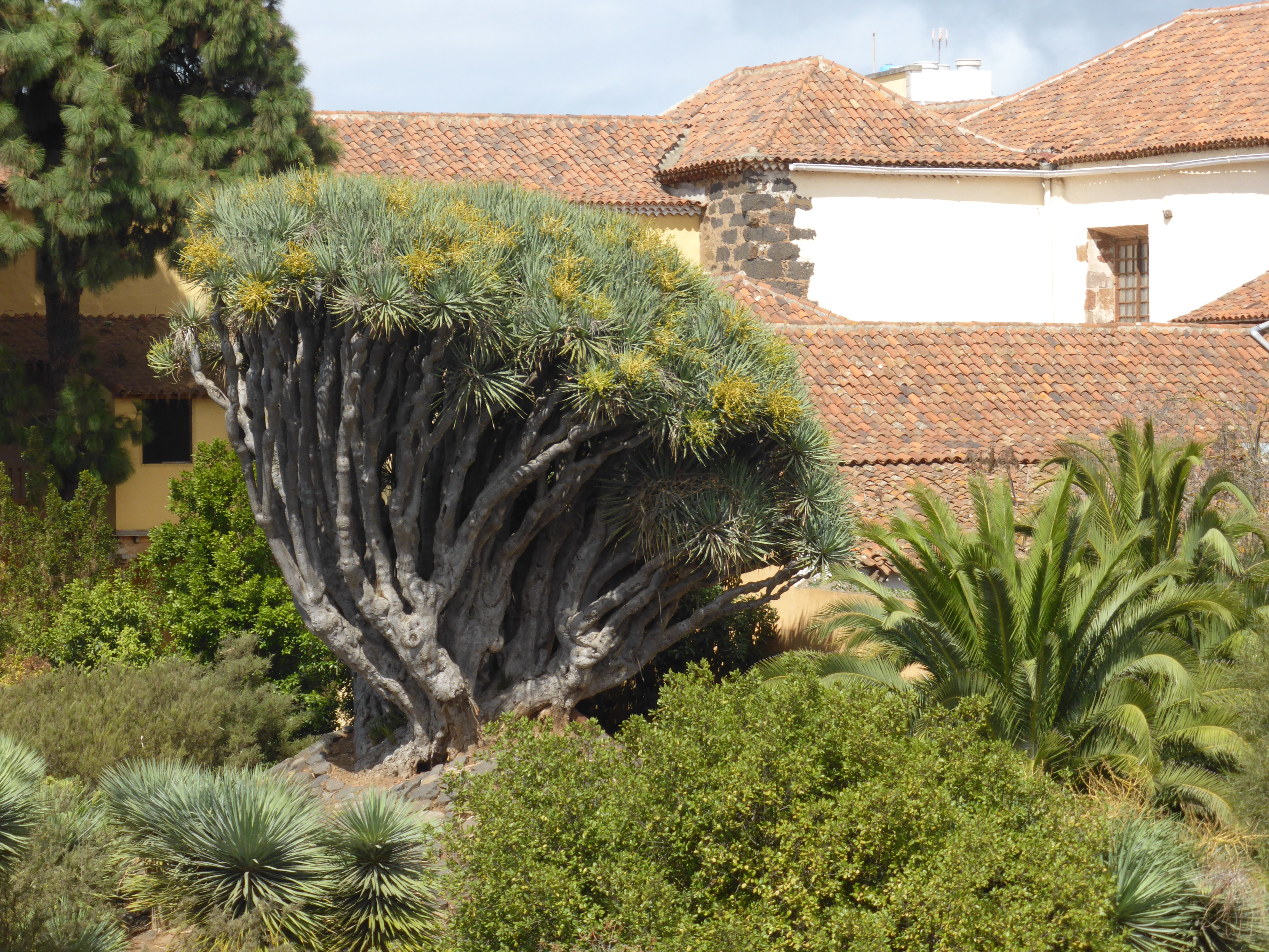 El más viejo drago (Dracaena draco) de la ciudad de San Cristóbal de La Laguna, es el drago del antiguo seminario, y ex convento de Santo Domingo. En fotografías antiguas se ve en todo su esplendor, con una densa copa. Se calcula que podría tener unos 500 años. Actualmente está desmejorado, por haberse desgajado muchas ramas.